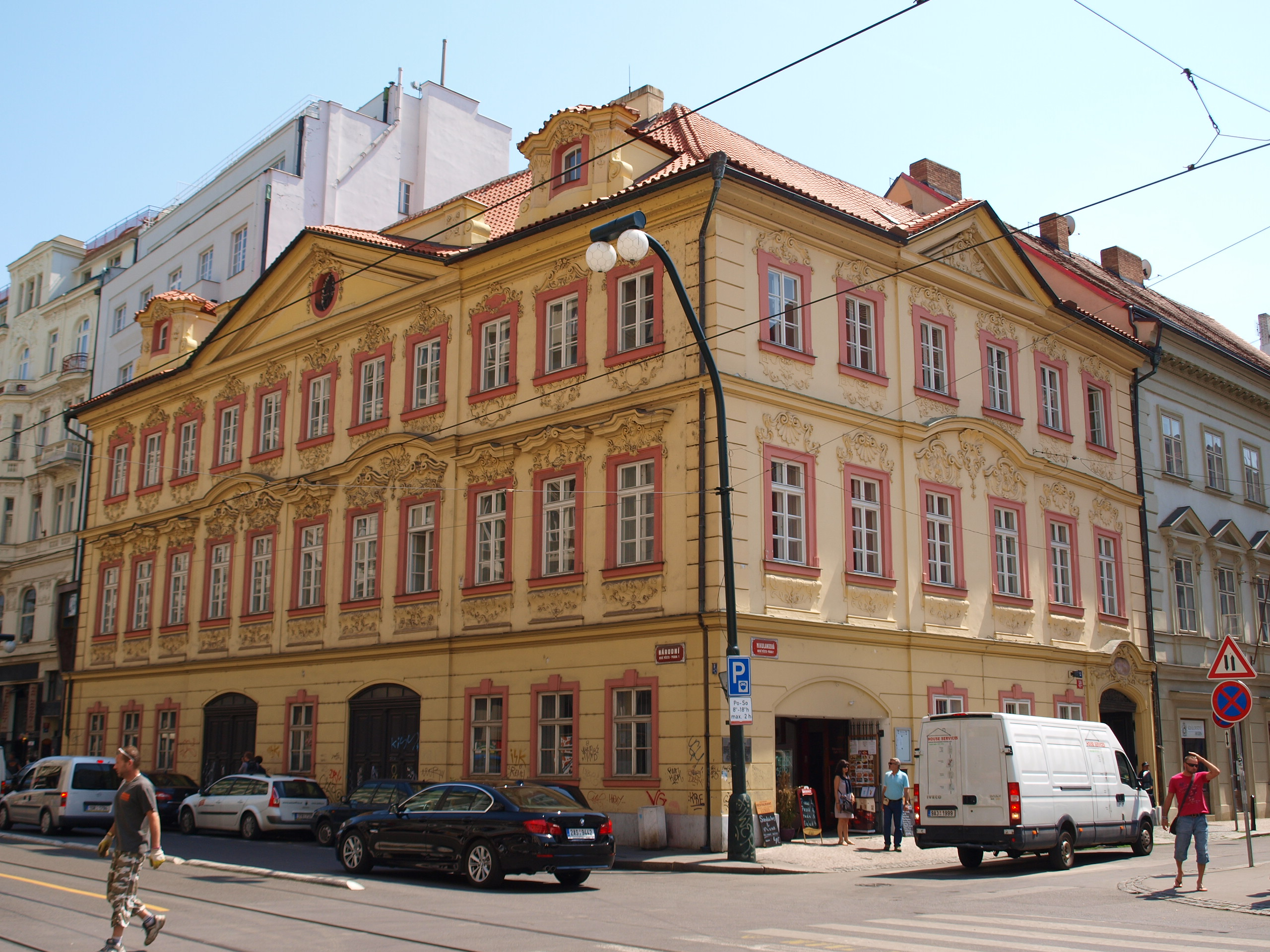 Schirdingovský palác